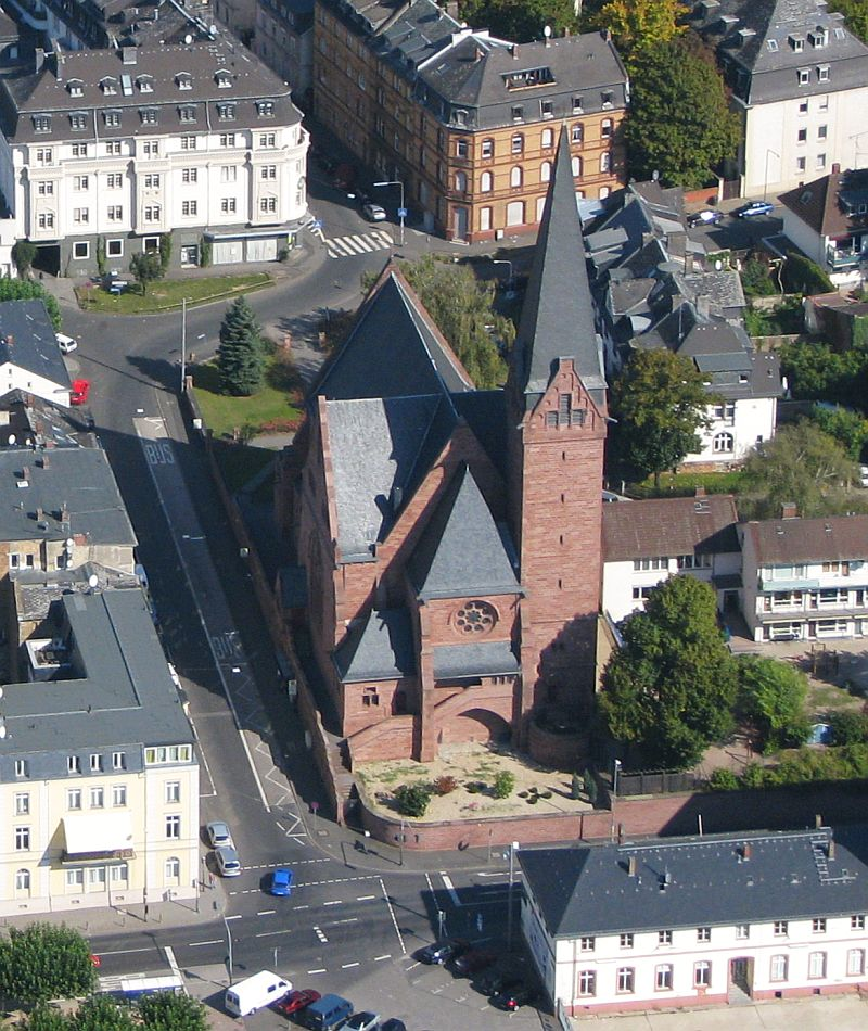 Luftbild Wiesbaden Oranier-Gedächtniskirche in Biebrich am Rheinufer Foto 2008 Wolfgang Pehlemann Wiesbaden IMG_0137